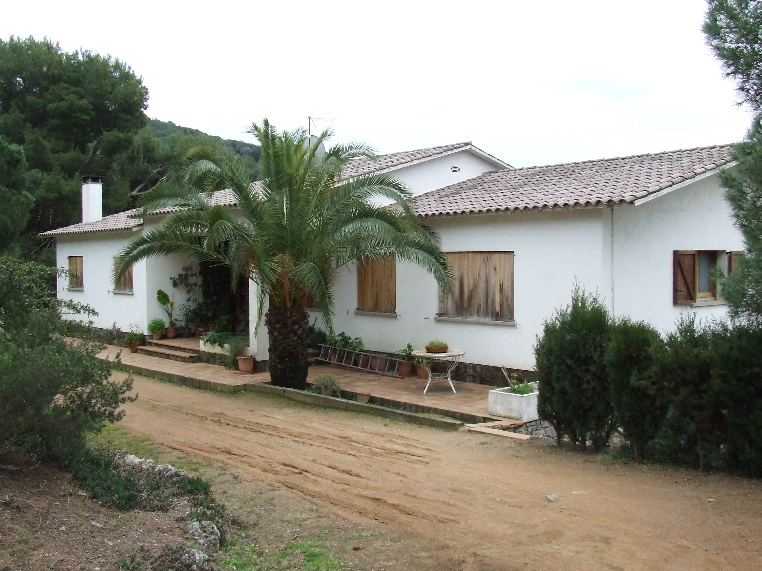 Can Rotxil (Bigues, Bigues i Riells, Vallès Oriental)